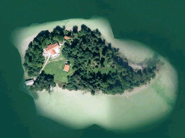 Luftaufnahme der Bayerischen Vermessungsverwaltung: Insel Wörth im Schliersee, Landkreis Miesbach, Bayern.